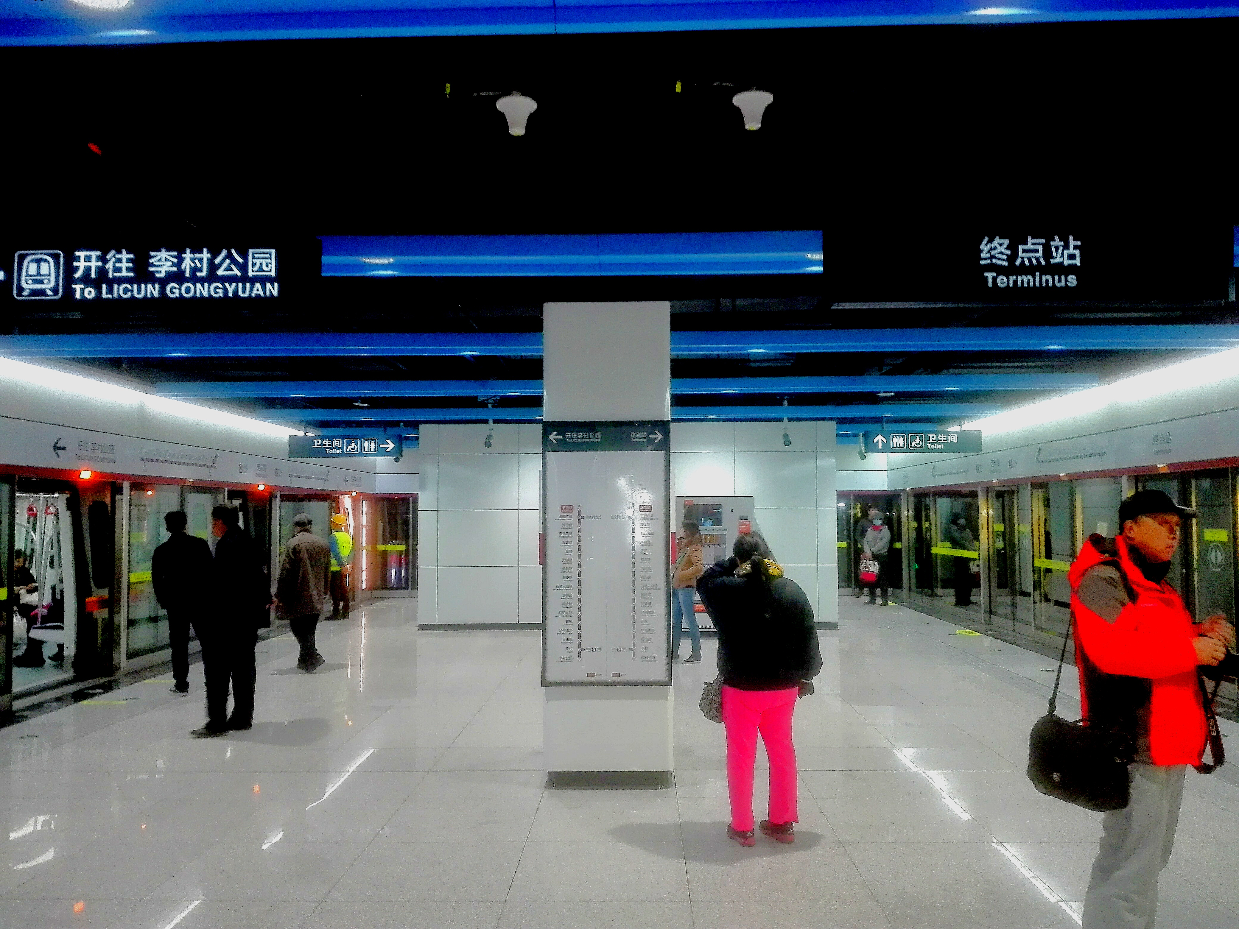 青岛地铁二号线芝泉路站站台